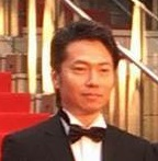 Nobu Morimoto from "kazokuhe" at Opening Ceremony of the Tokyo International Film Festival 2016.jpg